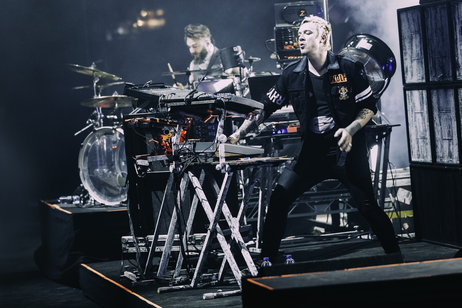 Lider The Prodigy